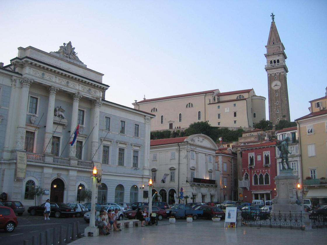 Tartini square in Piran, Slovenia. Giuseppe Tartini Monument. Sculptor: Antonio dal Zotto (1841-1918) Photo: Ziga 07:54, 12 August 2006 (UTC)